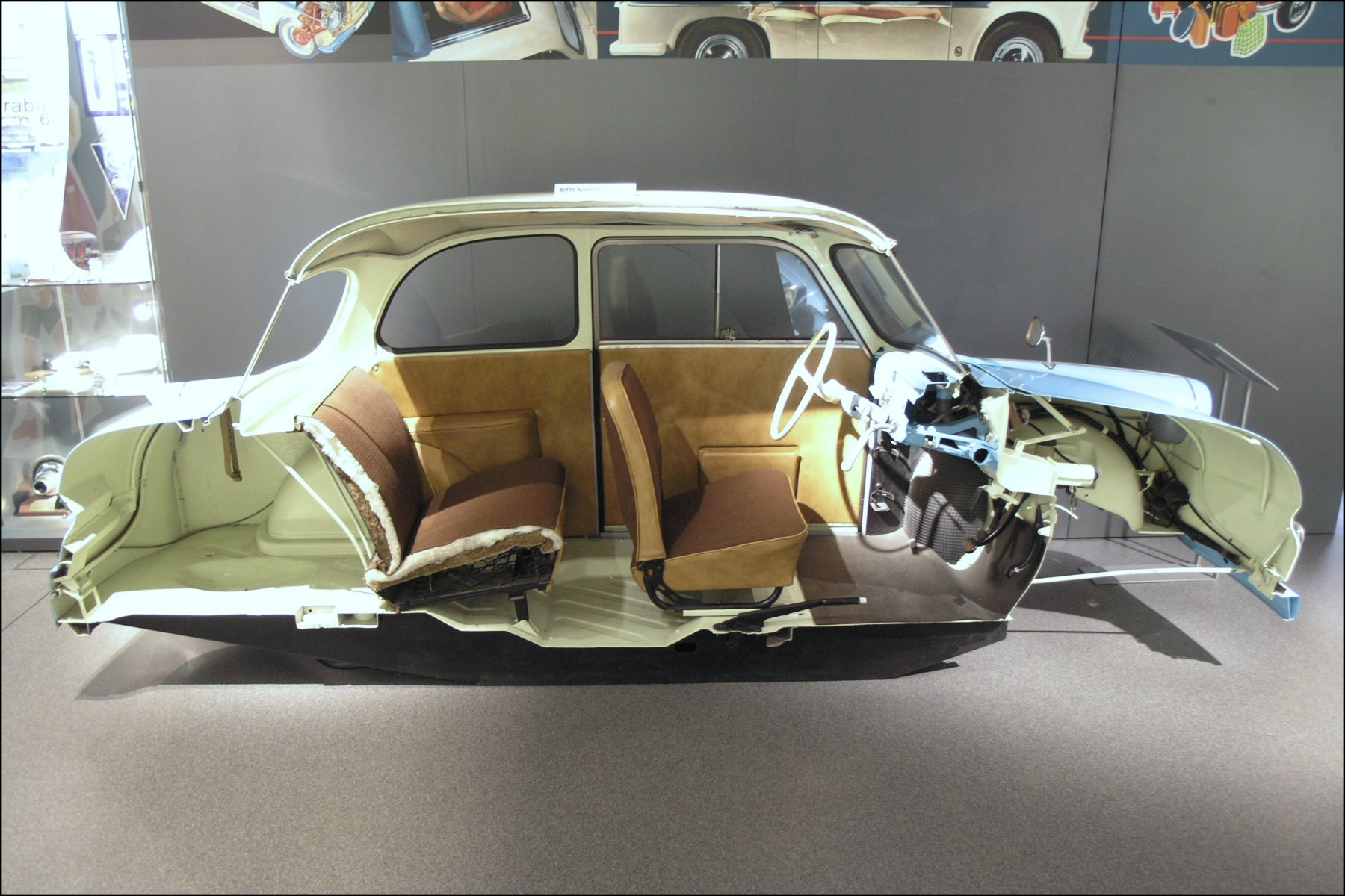 Trabant